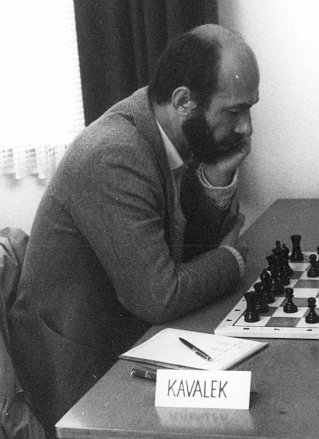 Lubomir Kavalek, chess grandmaster